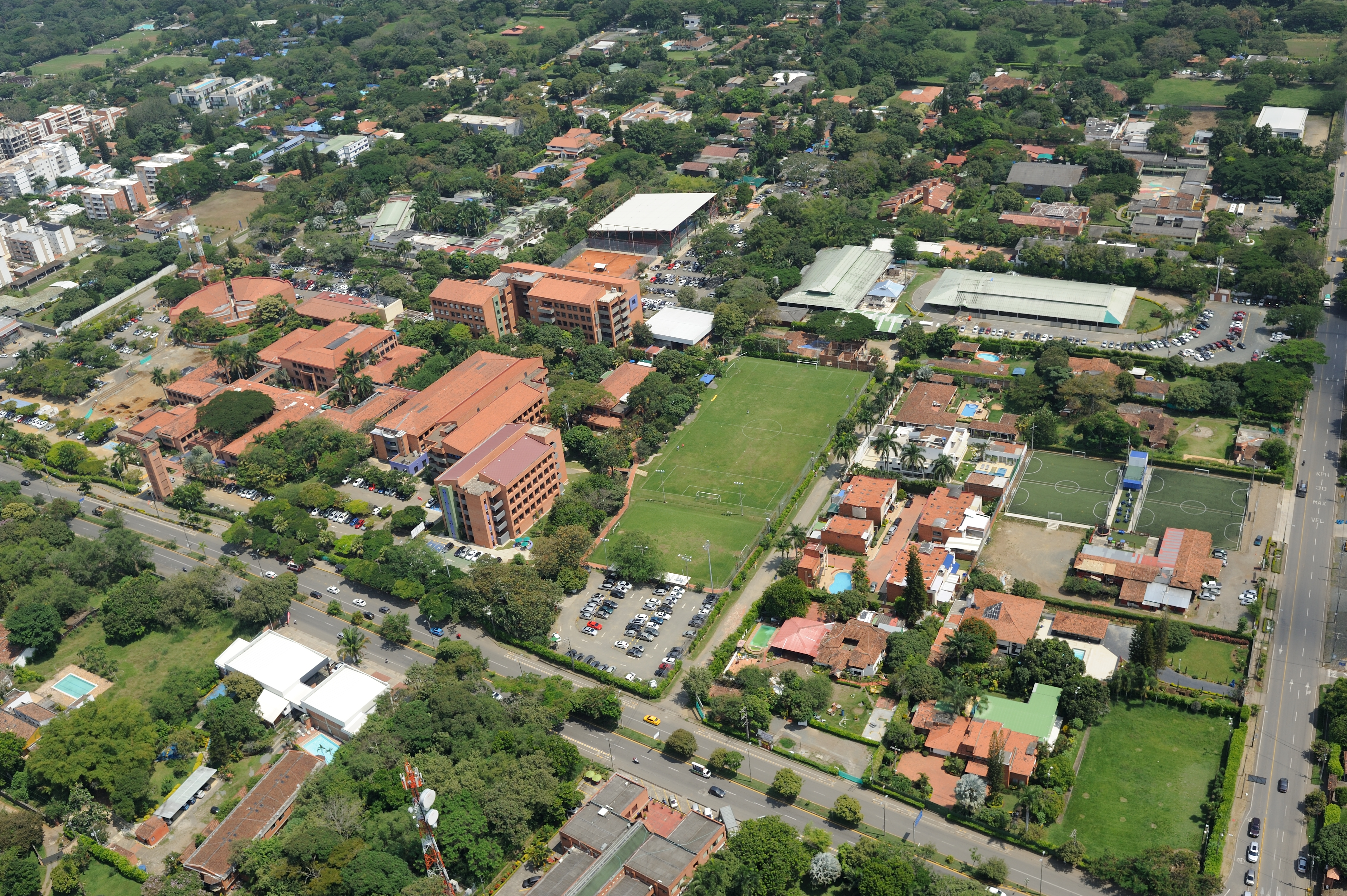 Exterior Universidad Icesi